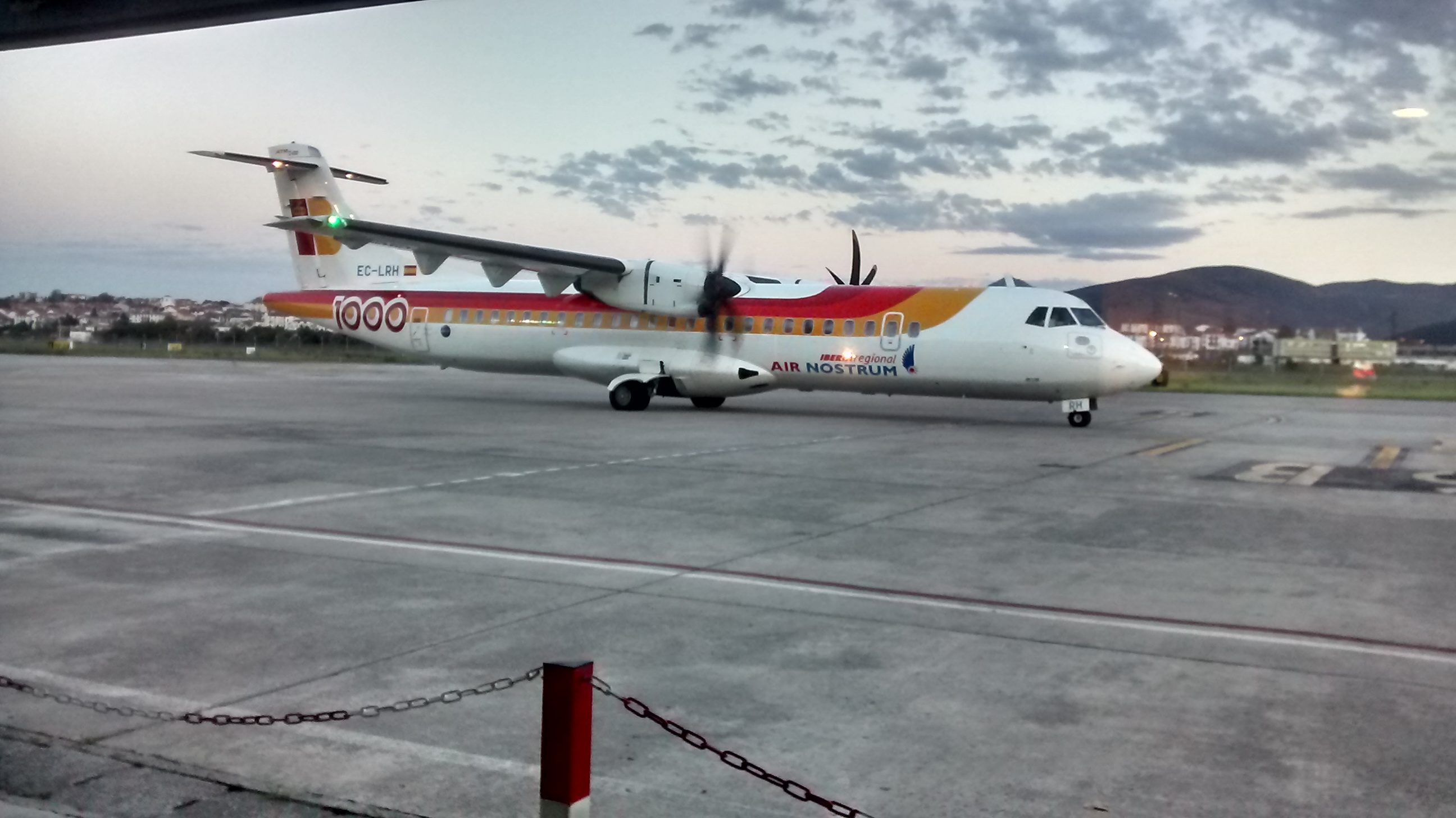 November 2014.